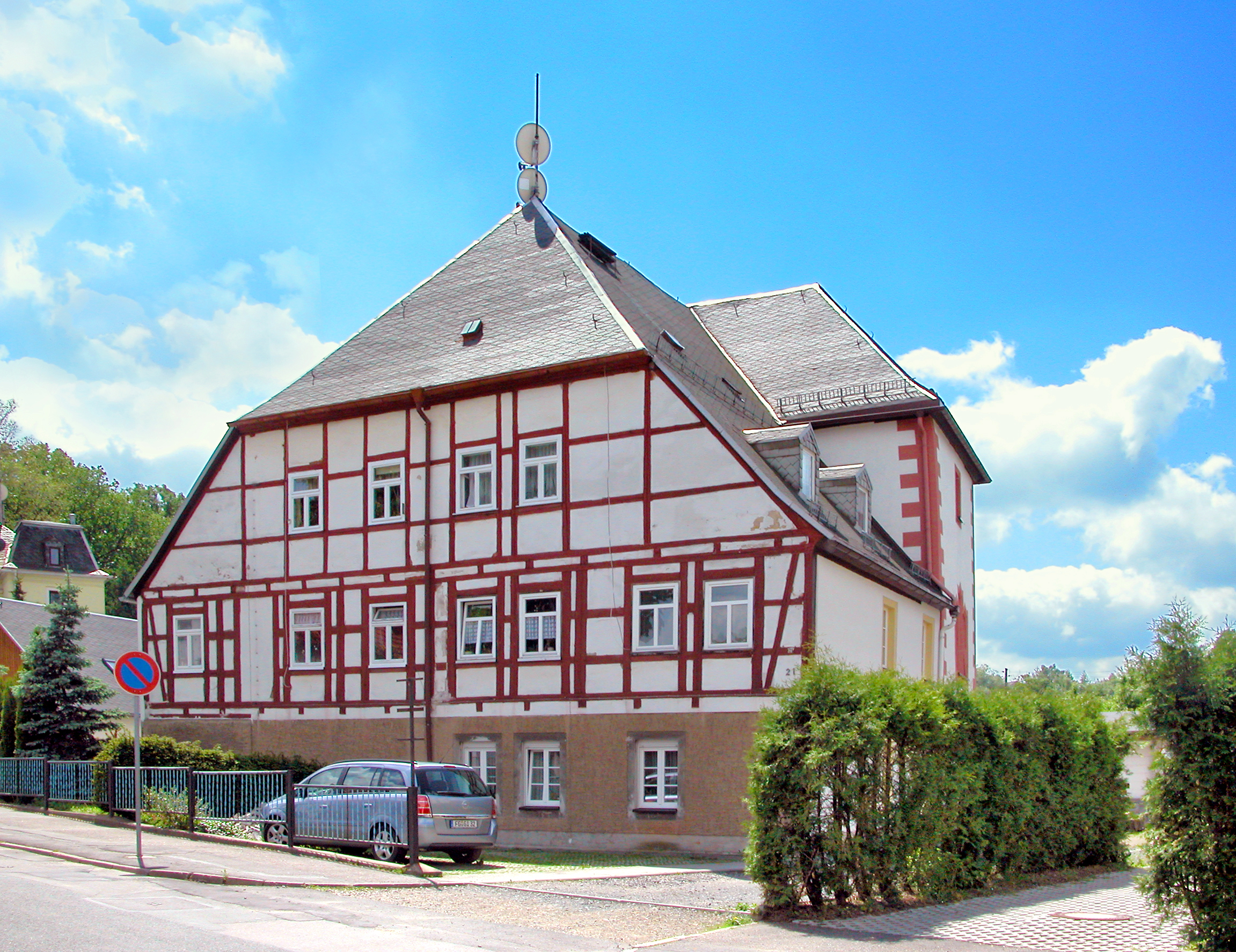 23.05.2009 09599 Freiberg, Agricolastraße 21 (GMP: 50.928223,13.337648): Herrenhaus Lößnitz im Münzbachtal. Im Kern spätgotisch unter Georg Alnpeck um 1500 errichtet. Mitte des 18. Jahrhunderts an- und umgebaut. Heute Mehrfamilienwohnhaus. Straßenseite, Sicht von NO. [DSCN37667.TIF]20090523260DR.JPG(c)Blobelt